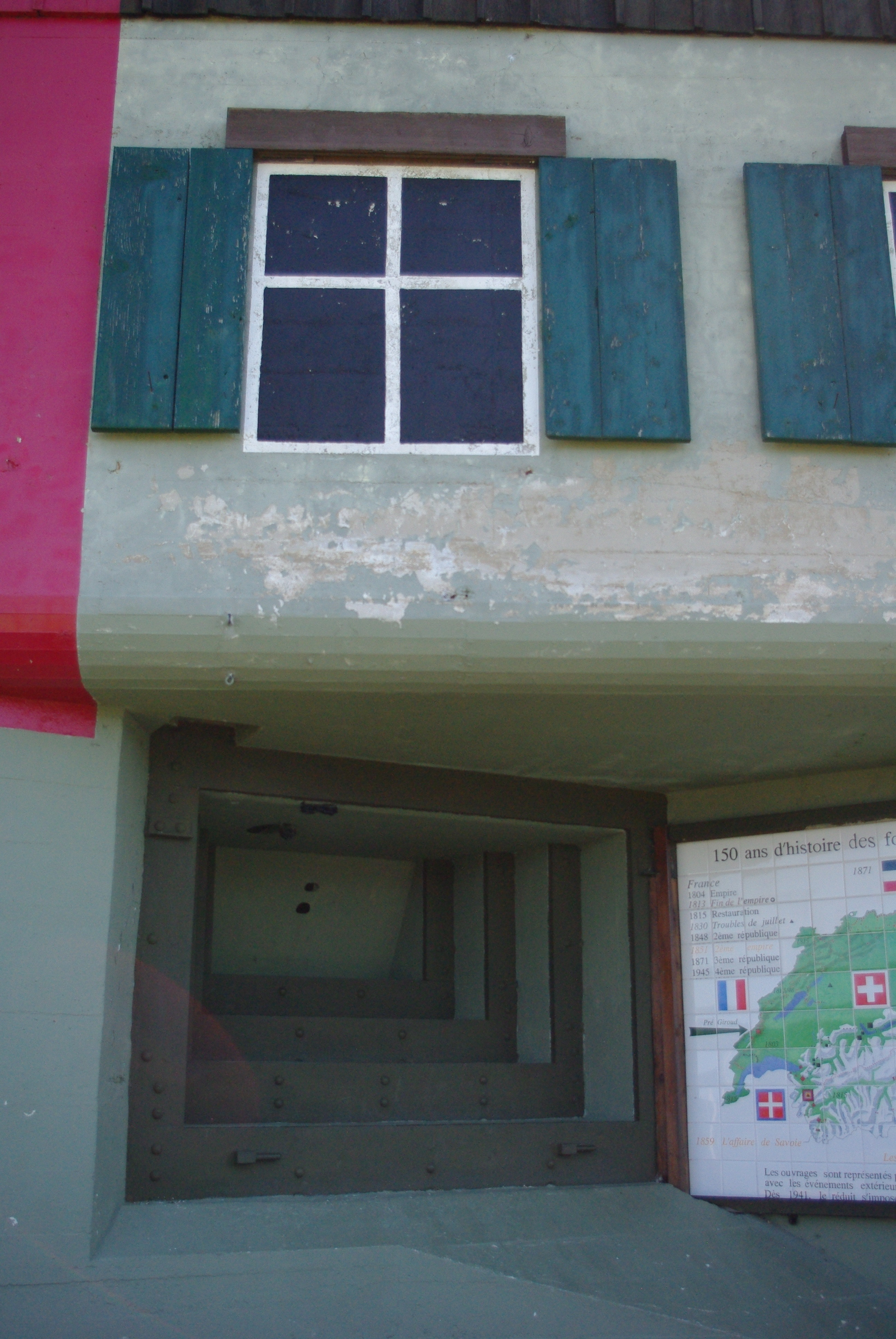 Fausse fenêtre et ouverture pour mitrailleuse au fort de Pré-Giroud lors de la sortie photo du 18-08-2012